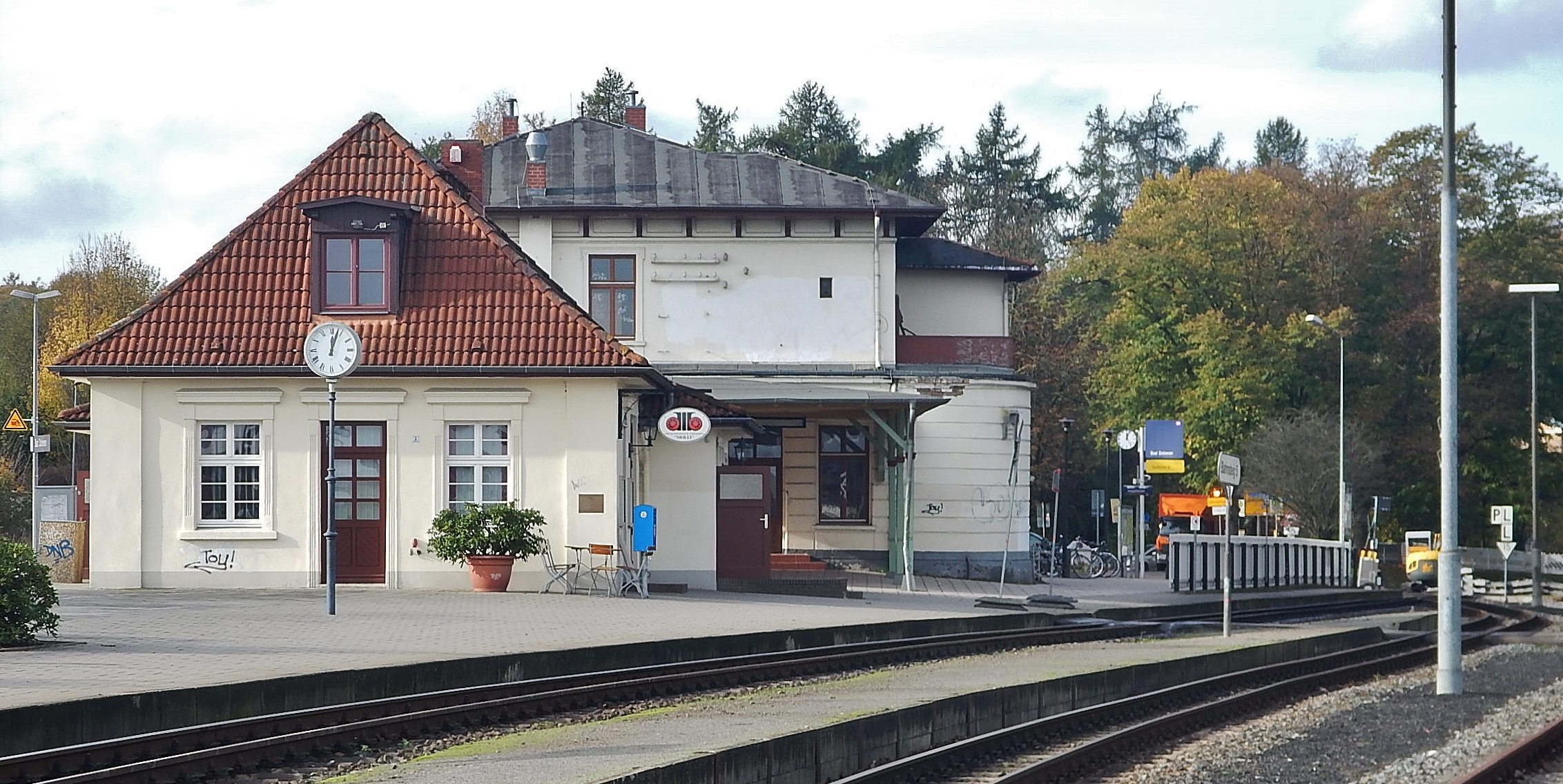 Bahnhof Bad Doberan der nostalgischen Dampfeisenbahn Molli zwischen Kühlungsborn und Bad Doberan